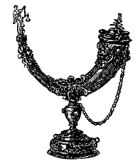 Smörjhornet